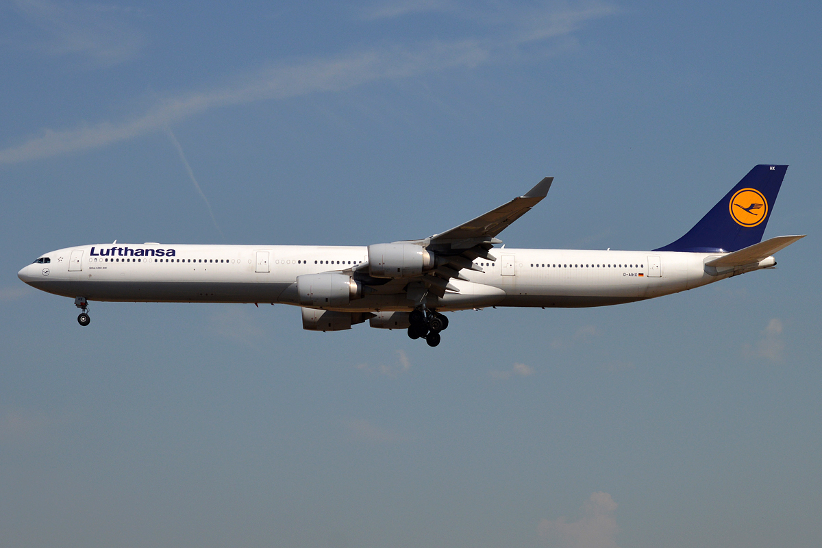 Lufthansa, D-AIHX, Airbus A340-642